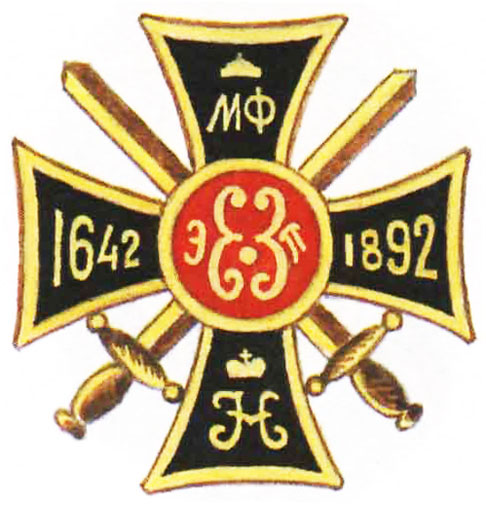 Badge of Erivansky 13-th grenader Regiment